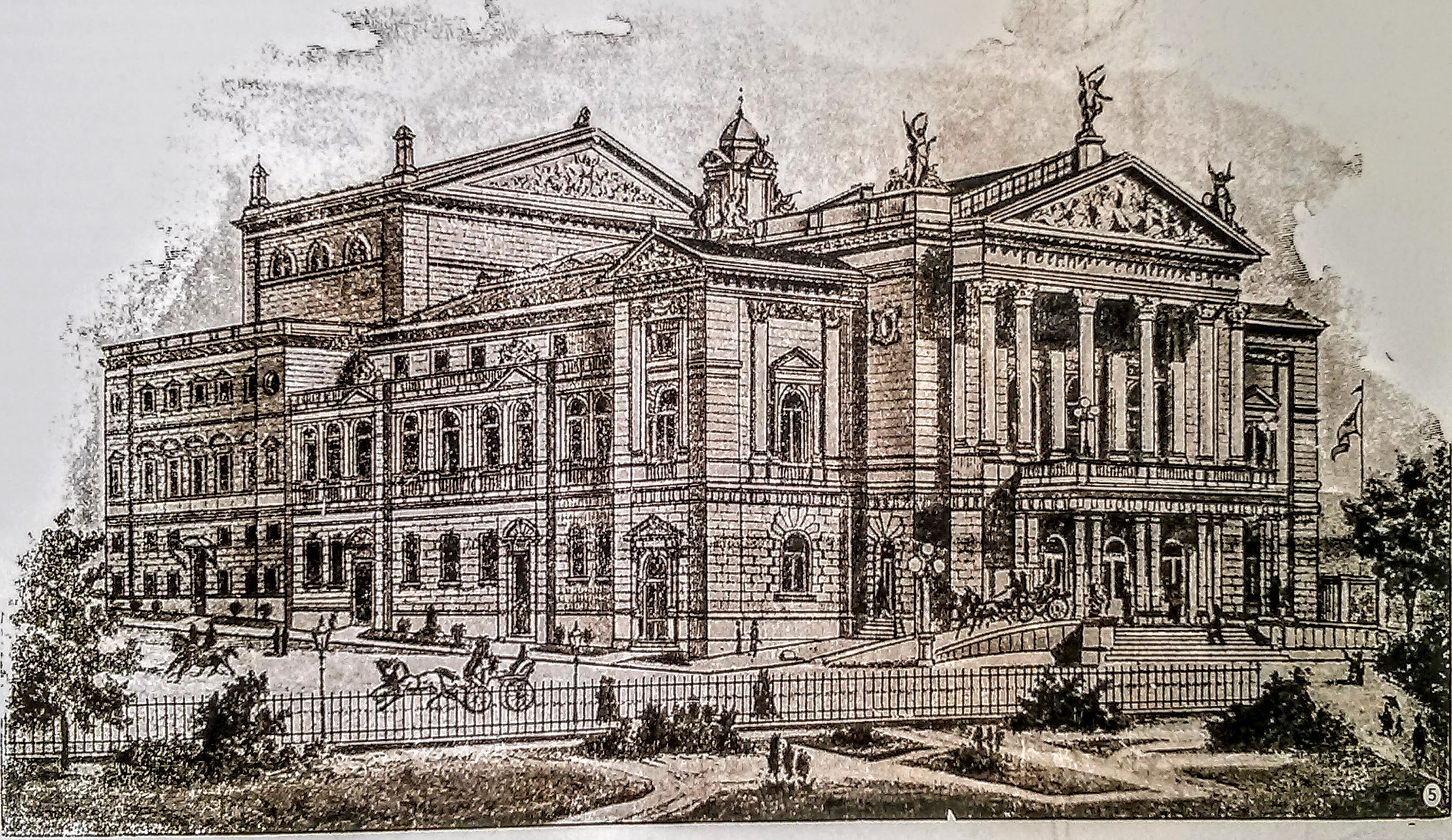 Budova Nového německého divadla v době svého vzniku - 1888